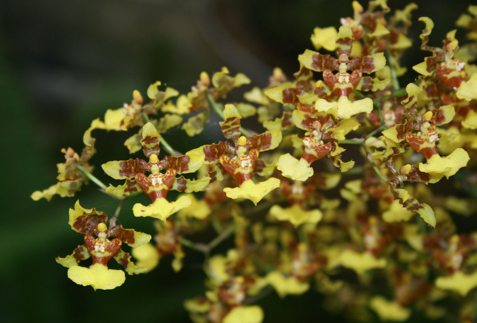 Oncidium polycladium, Orchideen (Orchidaceae) - Costa Rica: Prov. Cartago, Paraíso, Jardín Botánico Lankester/Lankester Botanical Garden, Orchid greenhouse